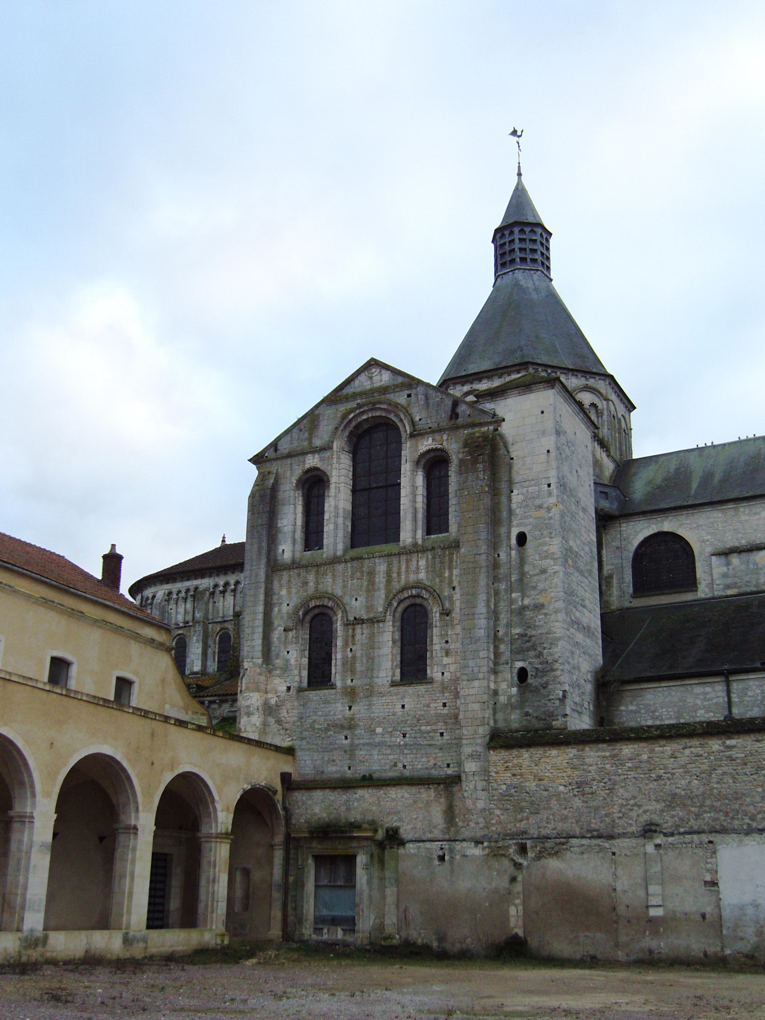 Reste des Kreuzganges und nördliches Querschiff von Notre Dame de La Charité